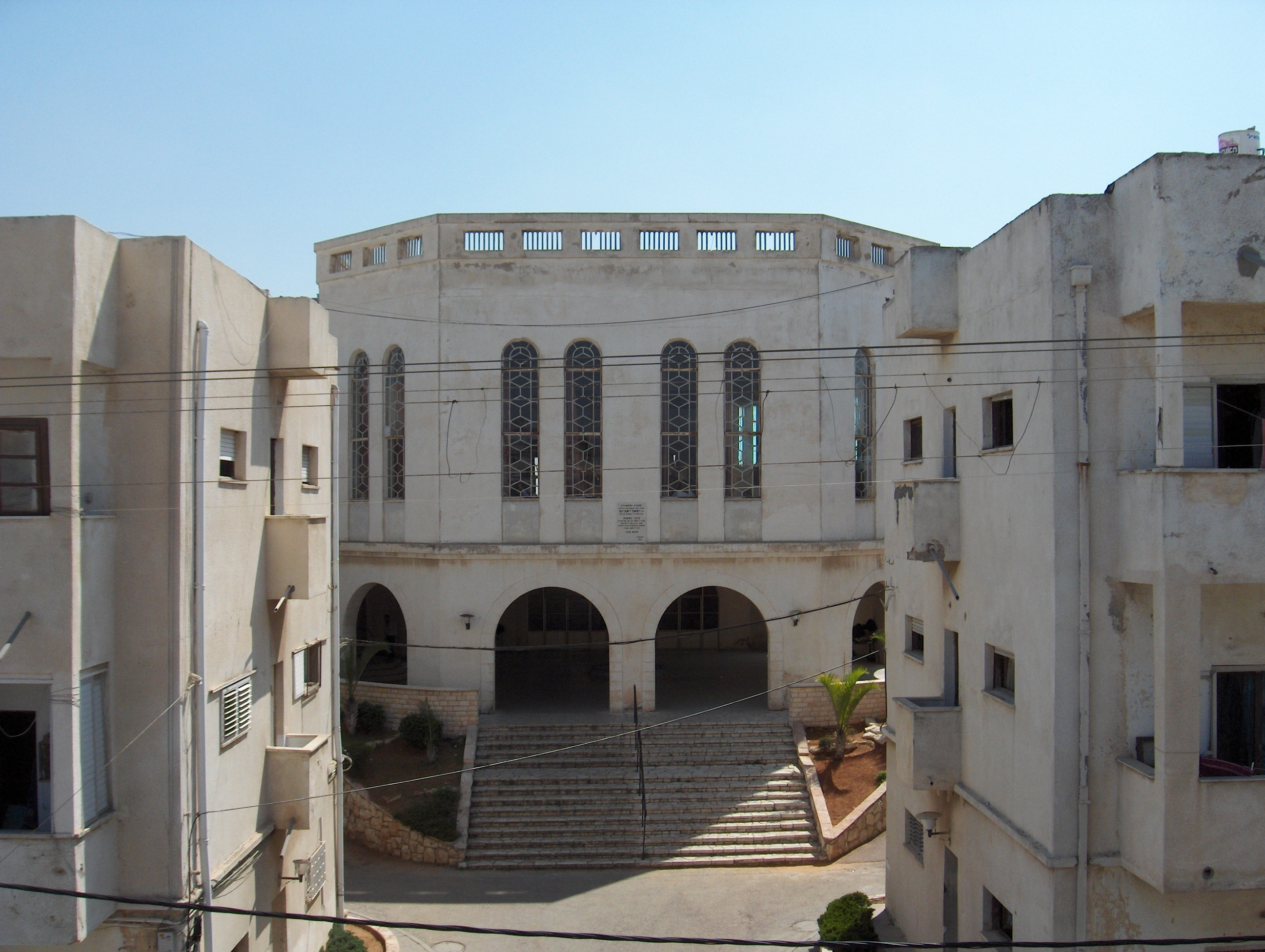 ישיבת סלבודקה בני ברק